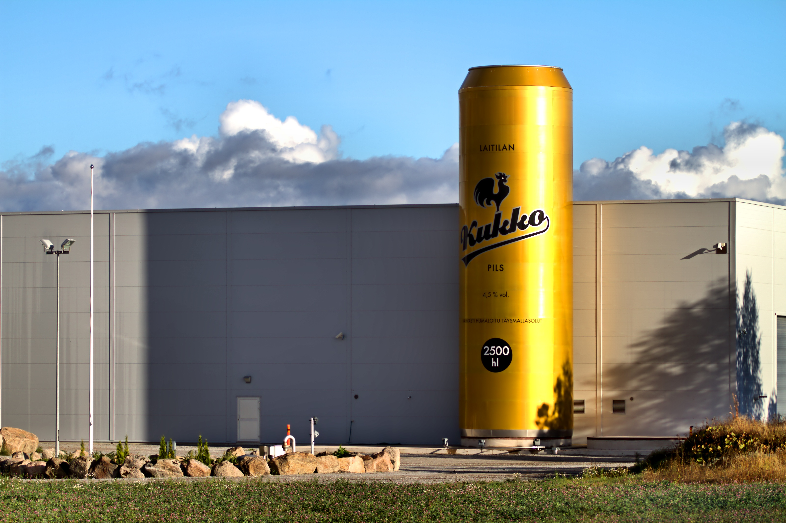 Laitilan Wirvoitusjuomatehtaan